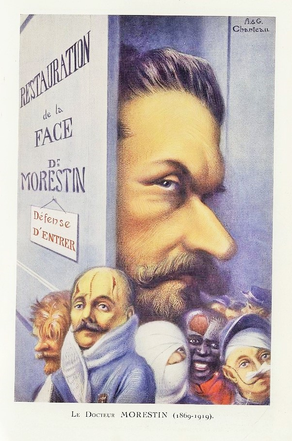 Le Docteur Morestin (1869-1919) Chanteclair . - 1922. - 17e année Livre : Page : Licence ouverte